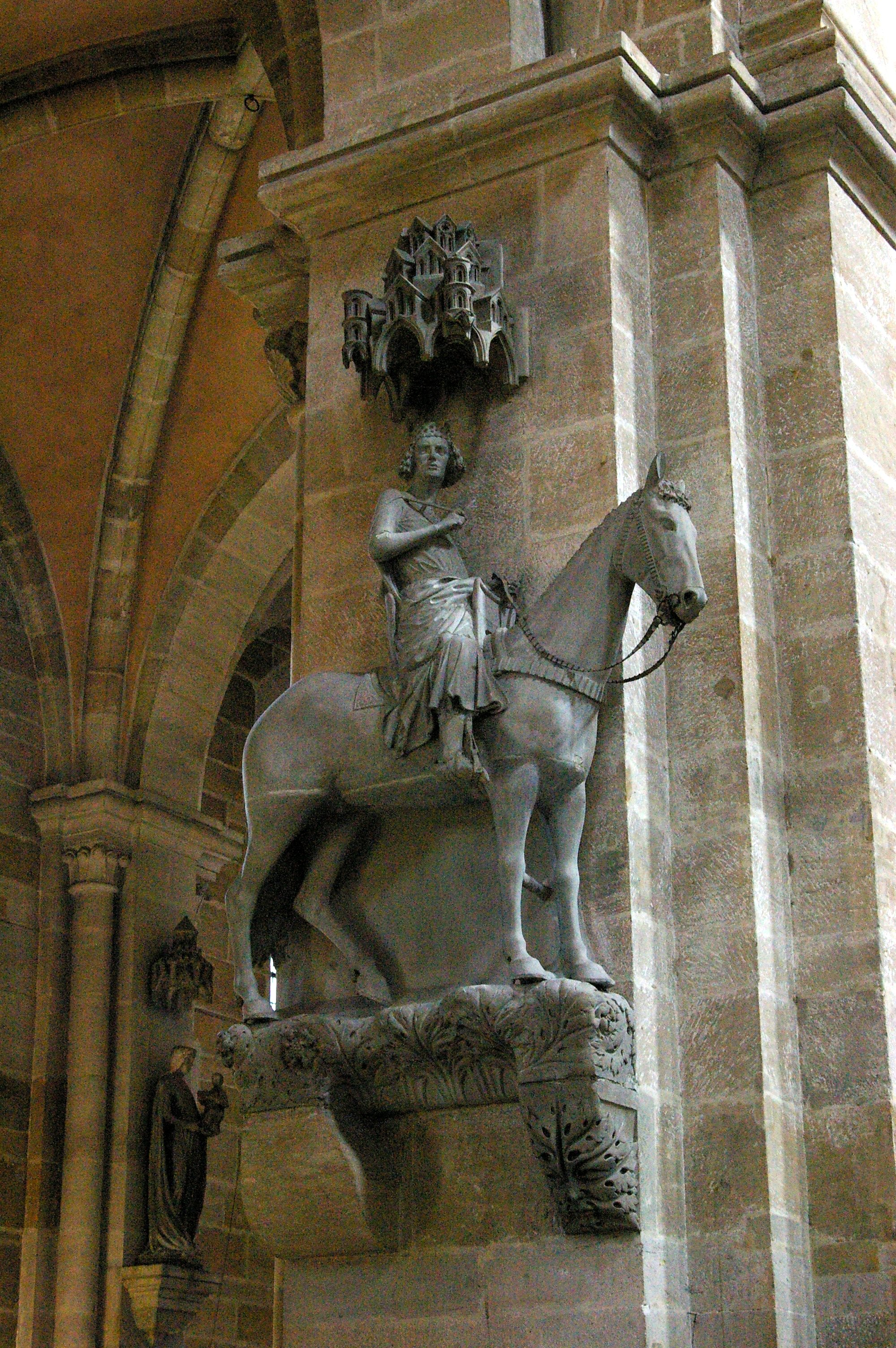 Bamberg Dom - Bamberger Reiter